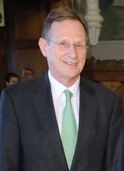 Szapáry György washingtoni magyar nagykövet 2012-ben